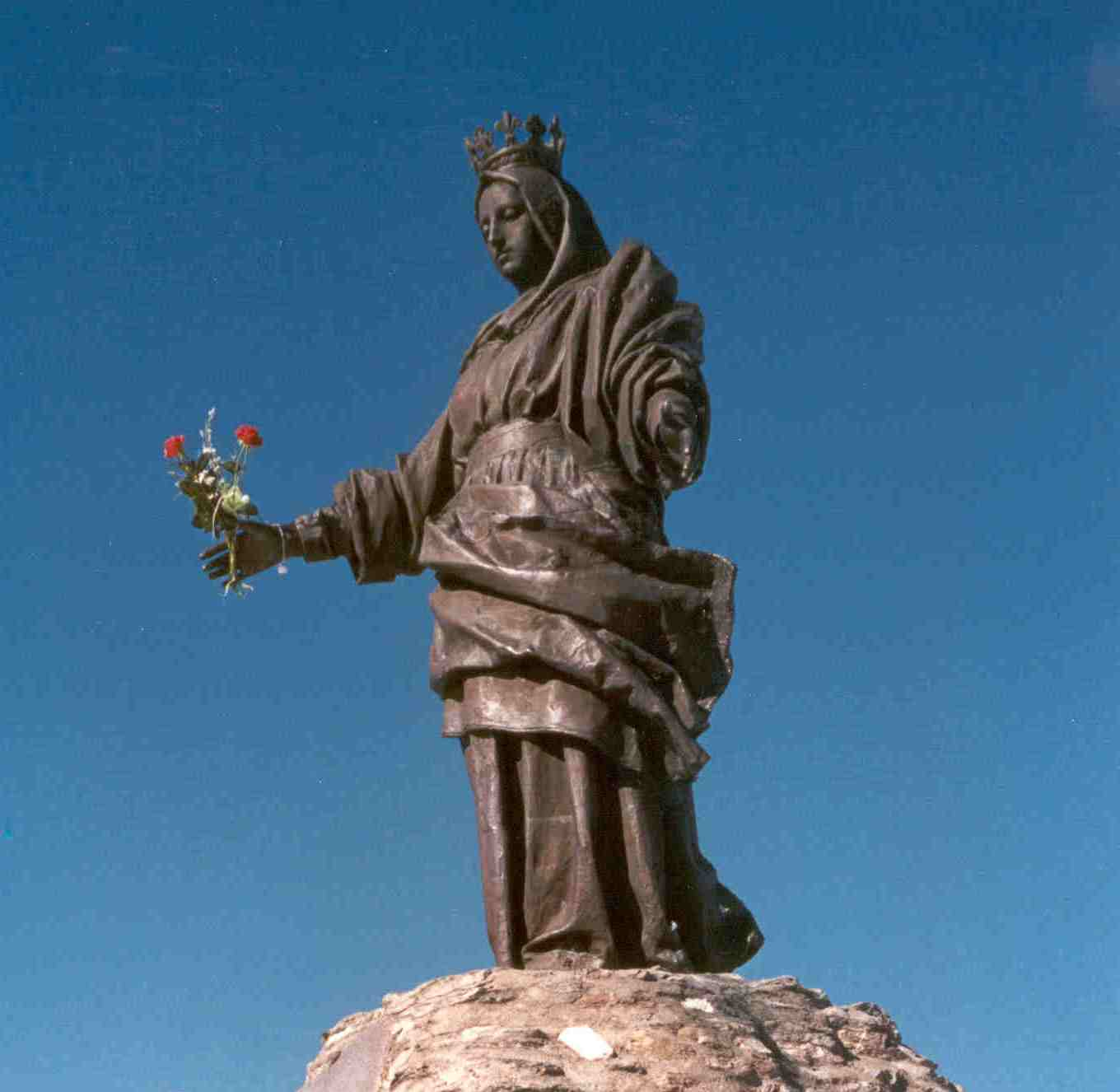 Statua della Madonna sulla cima del monte Rocciamelone